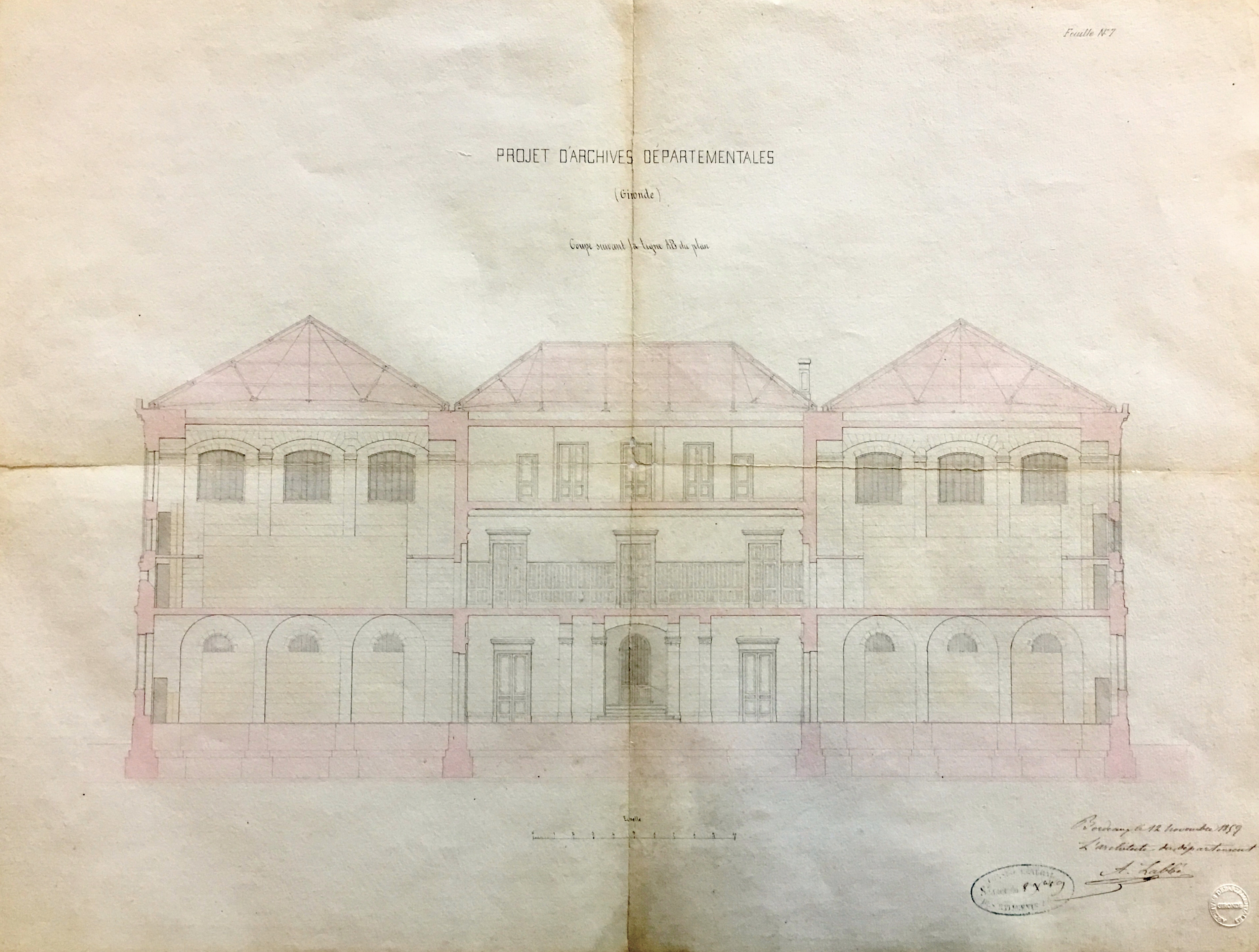 Plan du projet de construction de Pierre-August Labbé du 12 novembre 1859, coupe suivant la ligne AB du plan